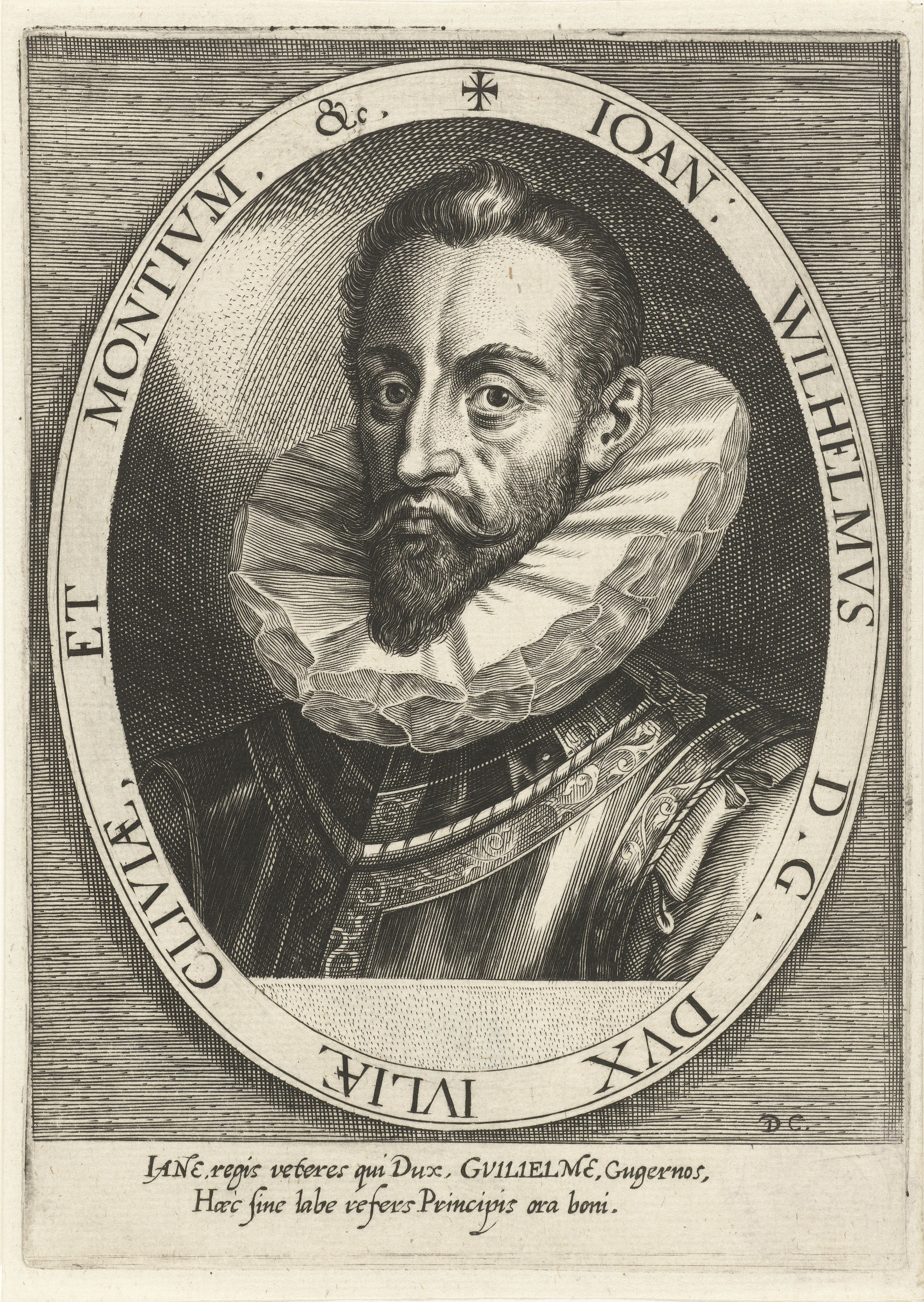 IdentificatieTitel(s): Portret van Johan Willem hertog van KleefAtrium Heroicum (serietitel)Objecttype: prent Objectnummer: RP-P-BI-6672Catalogusreferentie: Hollstein German 58Opschriften / Merken: verzamelaarsmerk, verso, gestempeld: Lugt 240VervaardigingVervaardiger: prentmaker: Dominicus Custos (vermeld op object)Plaats vervaardiging: AugsburgDatering: 1600 - 1604Fysieke kenmerken: gravureMateriaal: papier Techniek: graveren (drukprocedé)Afmetingen: plaatrand: h 177 mm × b 125 mmToelichtingIllustratie uit: D. Custos en M. Henning. Atrium heroicum Caesarum, regum aliorq. summatum ac procerum qui intra proximum seculum vixere, aut hodie supersunt, imaginib. Deel 1-4. Augsburg: D. Custos, 1600-1604.OnderwerpWie: Johan Willem van KleefVerwerving en rechtenVerwerving: overdracht van beheer 1816Copyright: Publiek domein